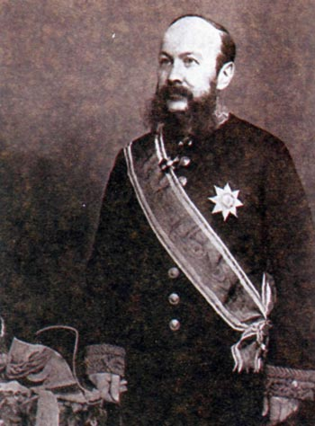 Abaza_Nikolaj_Savvich (1837-1901) Governor of Ryazan